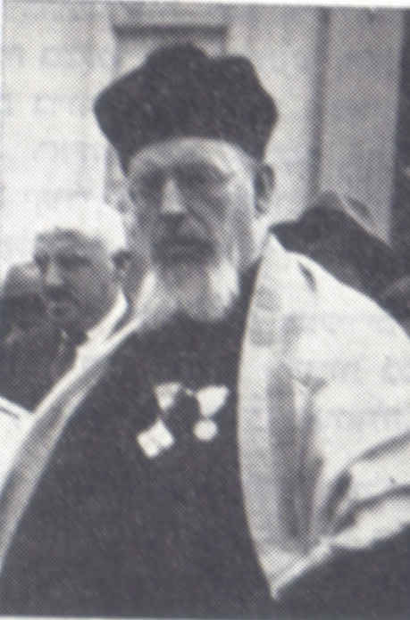 הרב שמואל בנימין בכר באמצע שנות ה-30.